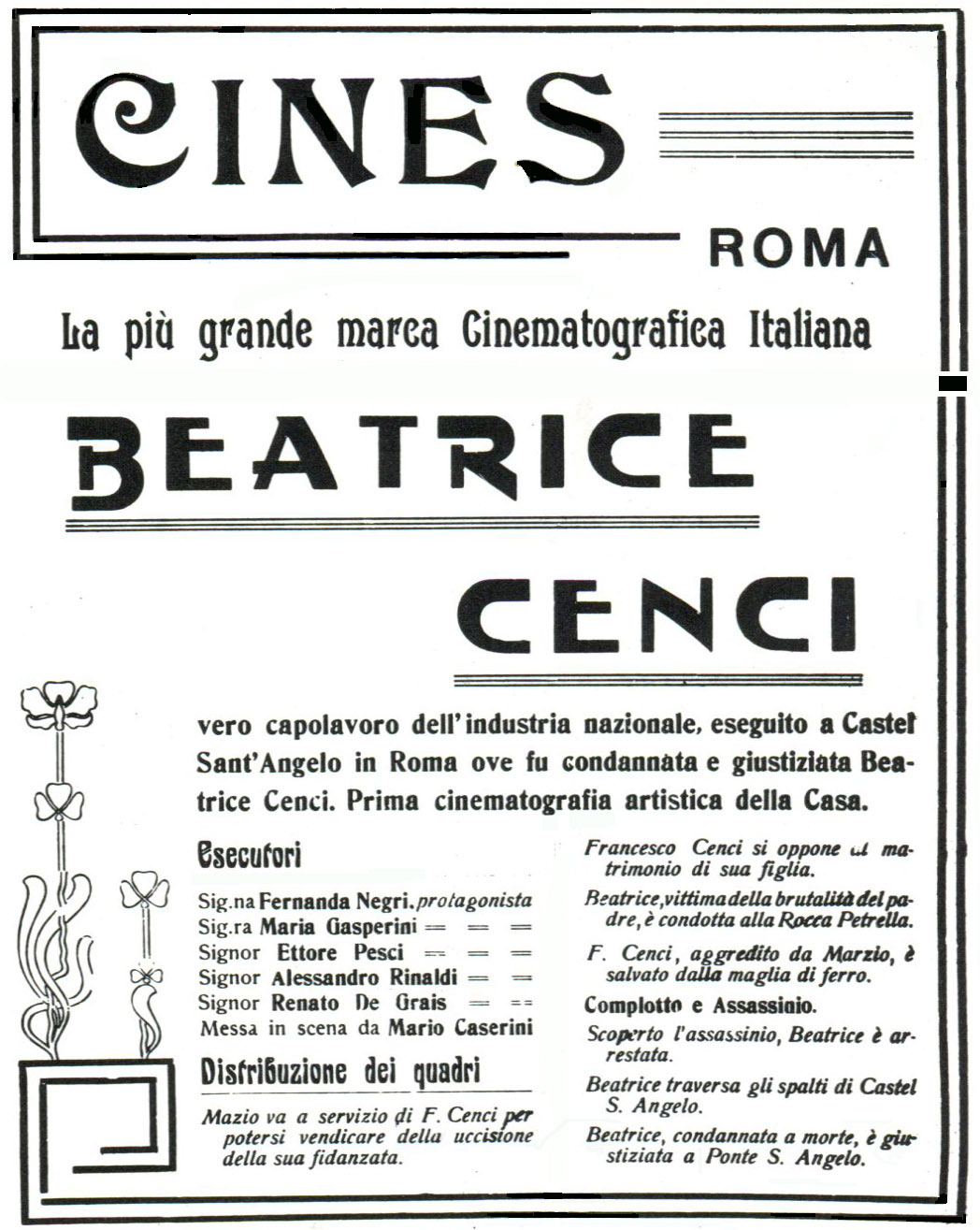 Pubblicità di Beatrice Cenci - prod "Cines" 1909 (regia M. Caserini)